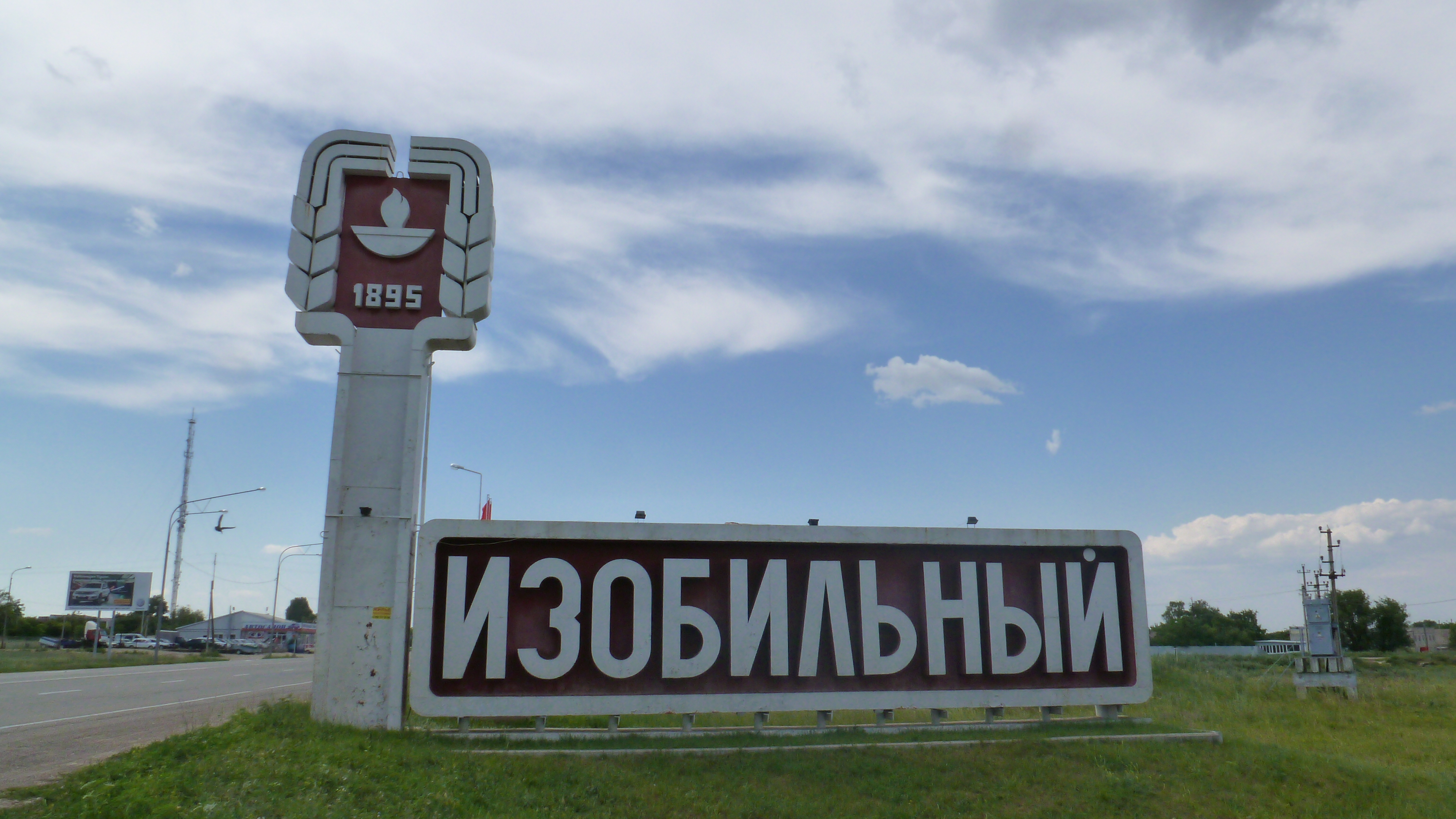 Стела в г. Изобильный